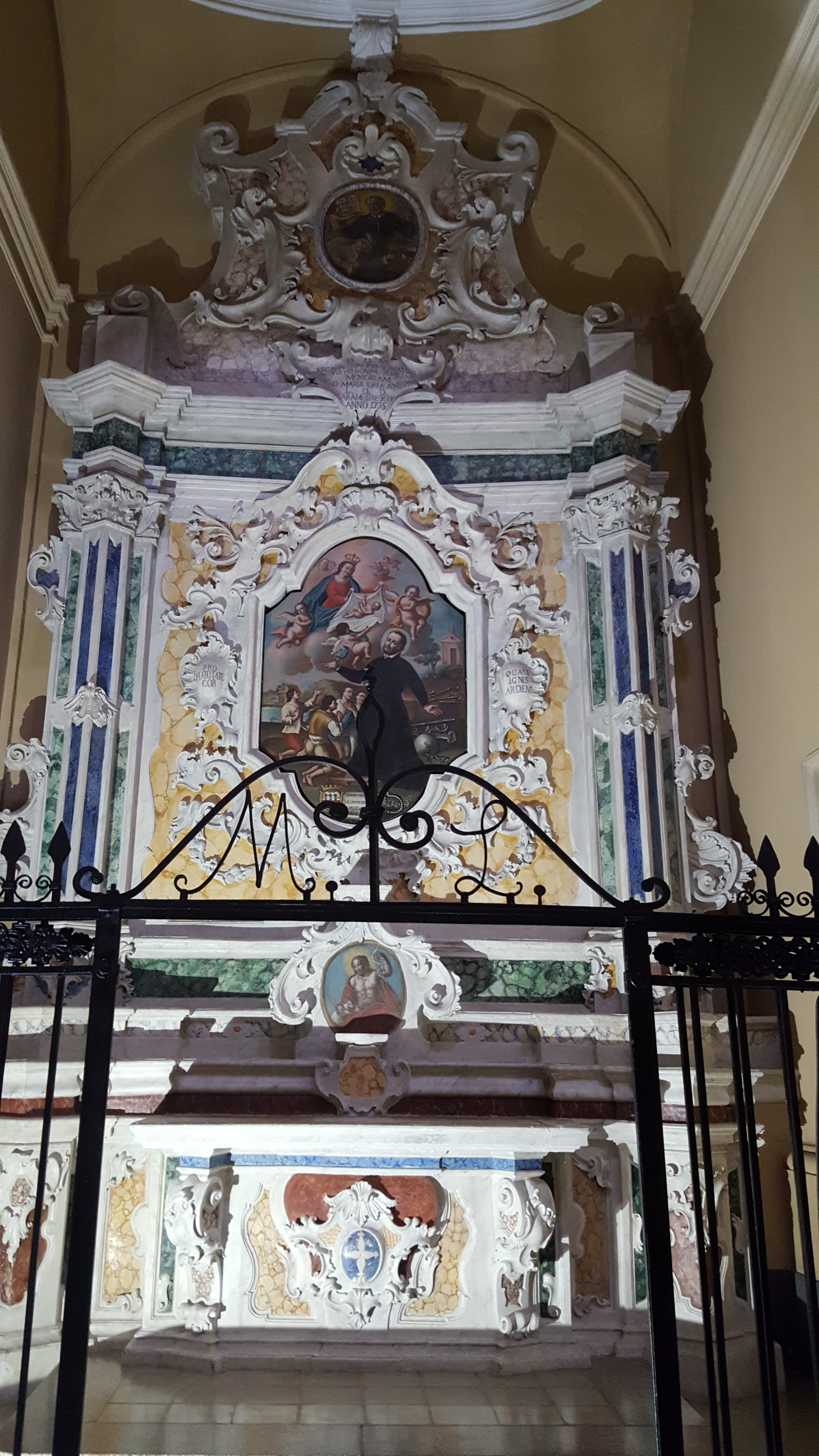 Cappella San Girolamo-Basilica San Martino, Martina Franca